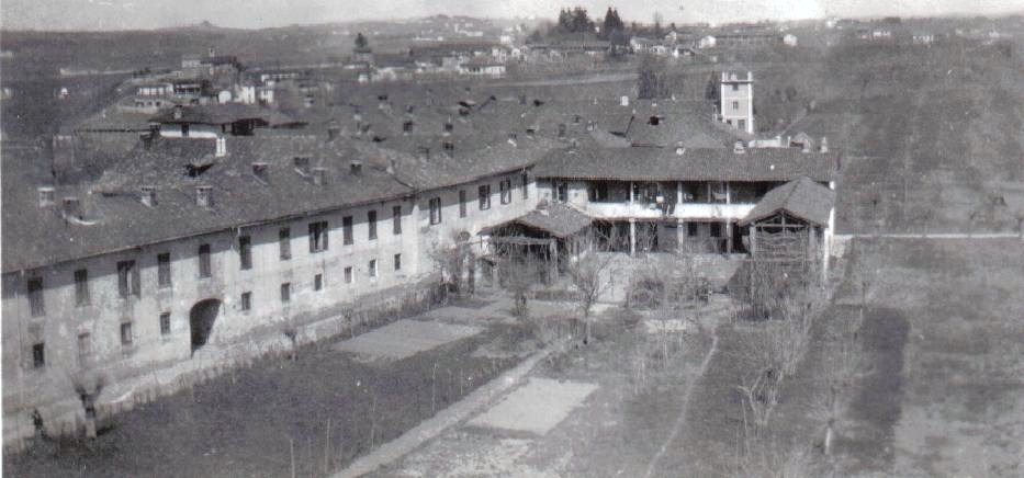 zona Cantone di Santo Stefano Arno provincia di Varese